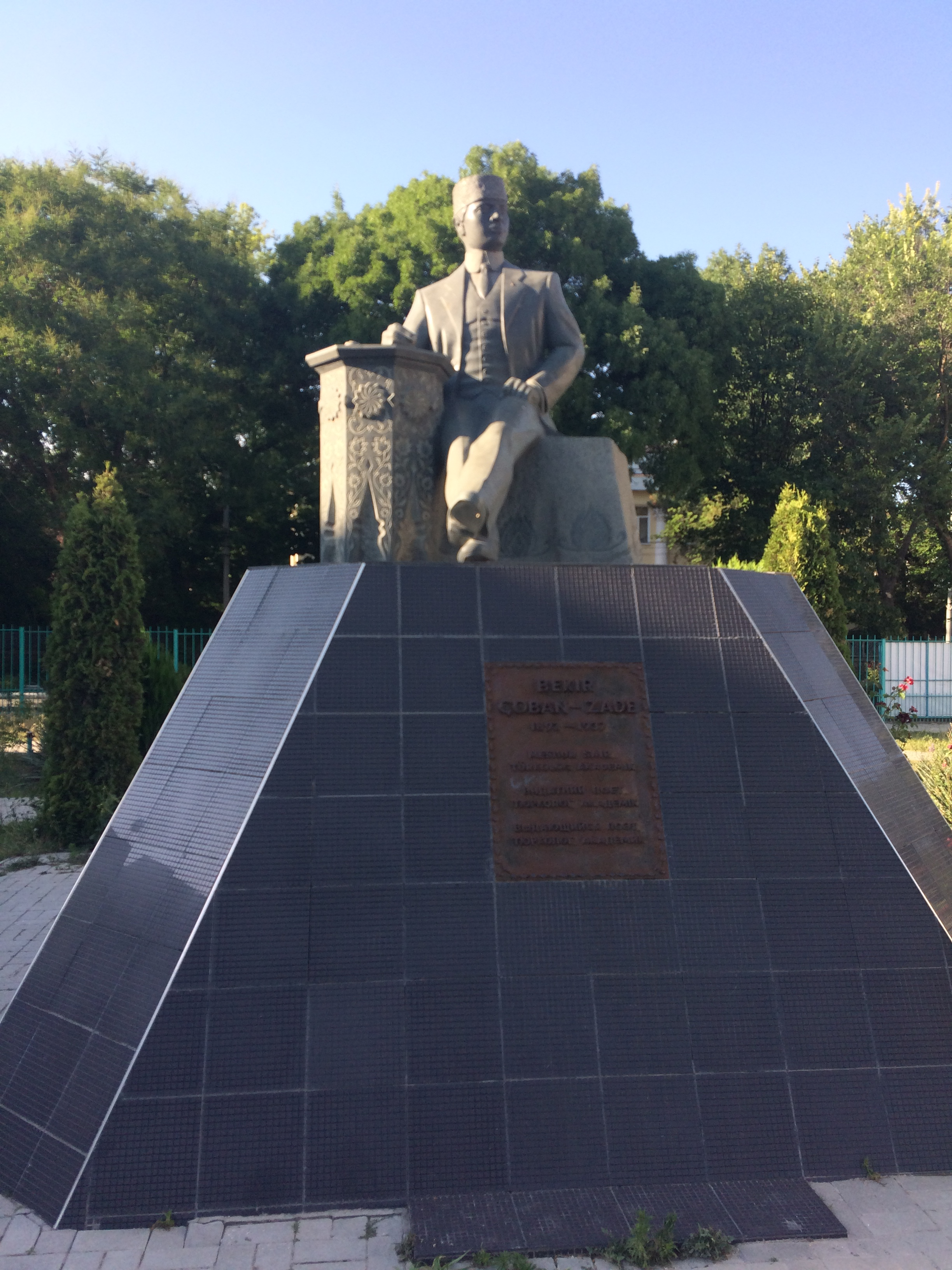 Памятник Бекиру Чобан-заде в Белогорске